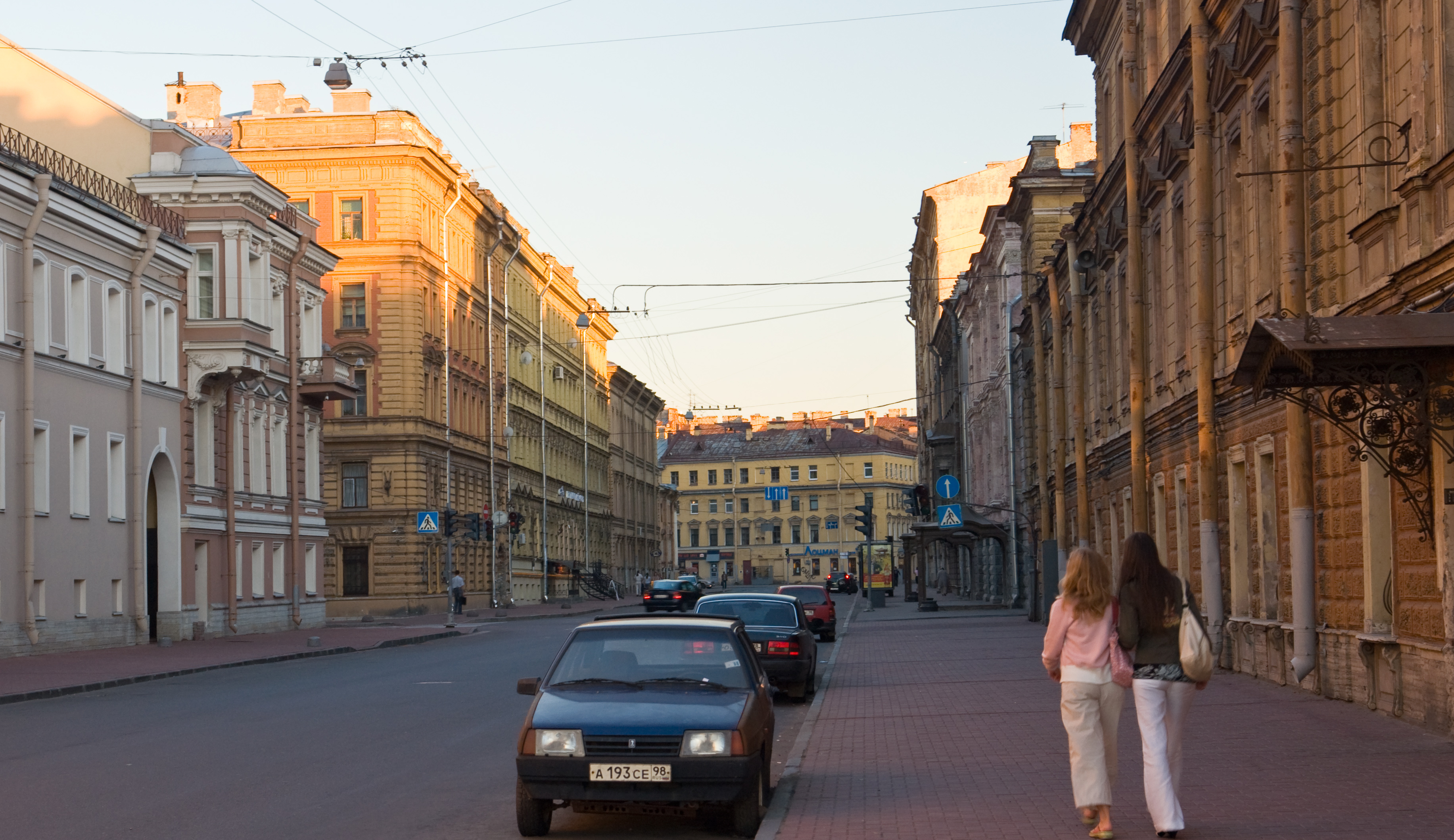 Гагаринская улица (вид с набережной Кутузова)